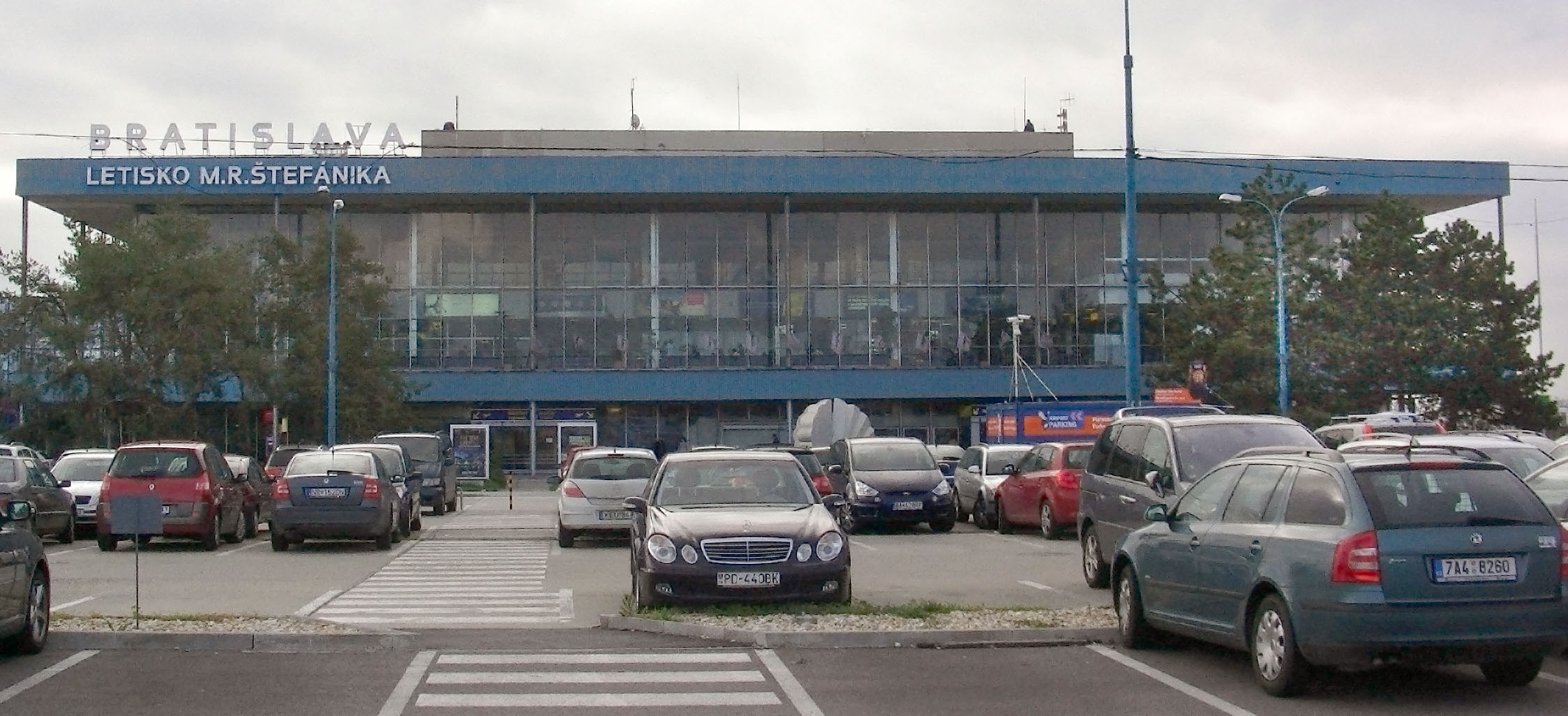 Bratislava Airport, Bratislava, Slovakia